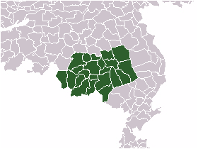 SRE-gemeenten met dank aan de kaart van Mtcv